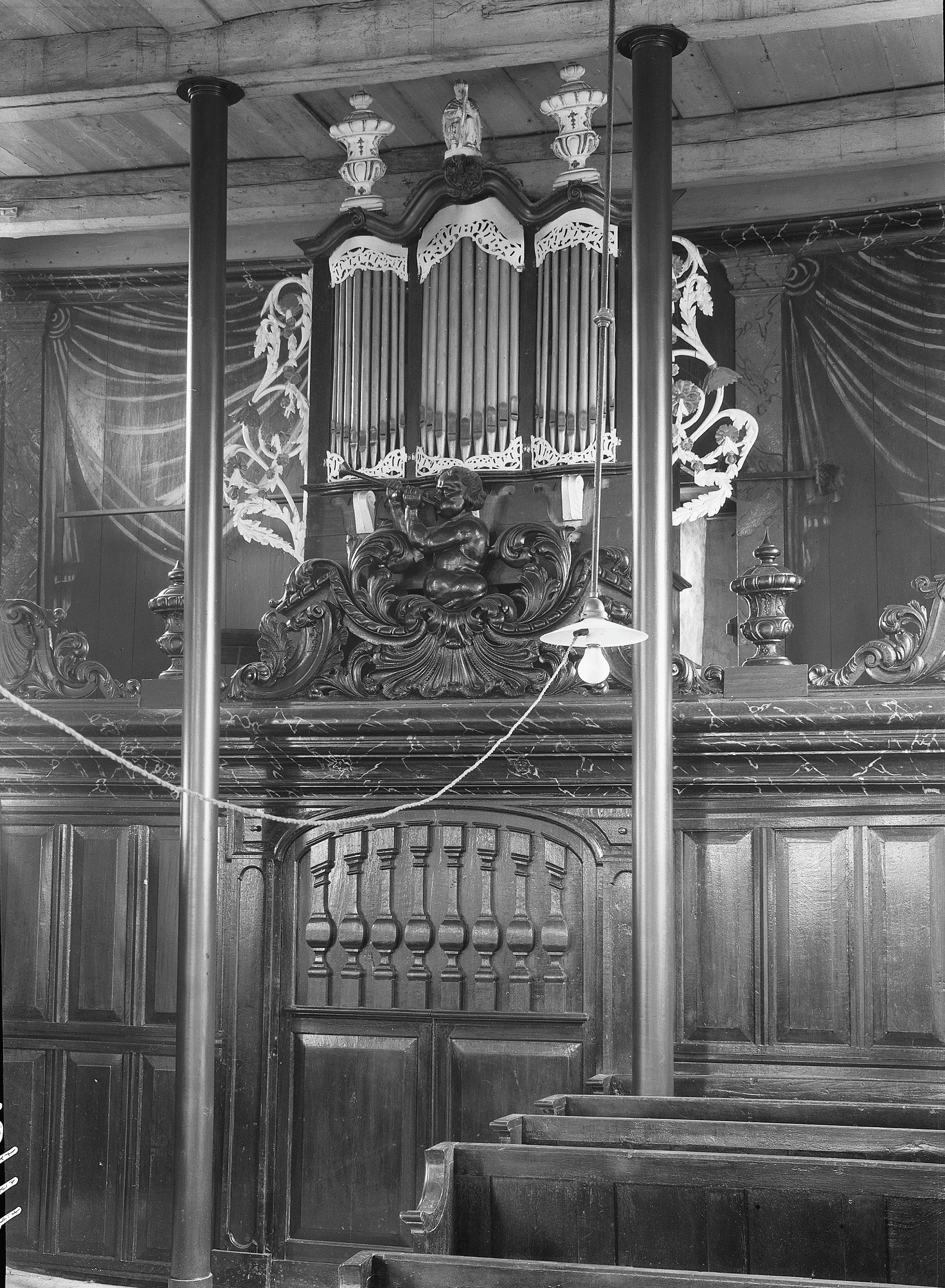 Nederlands Hervormde Kerk: orgelfront